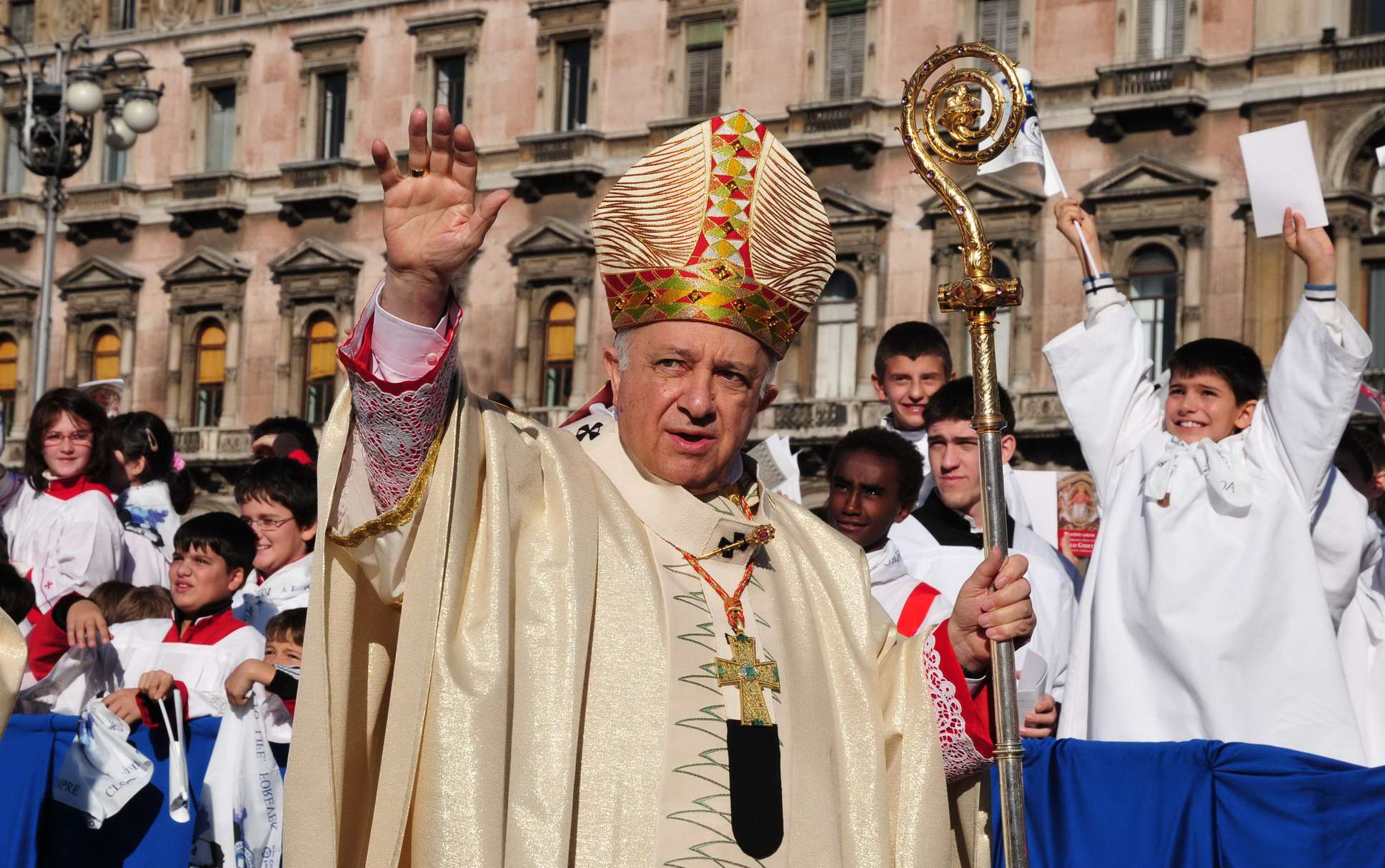 Il Cardinale Dionigi Tettamanzi in occasione della beatificazione di don Carlo Gnocchi